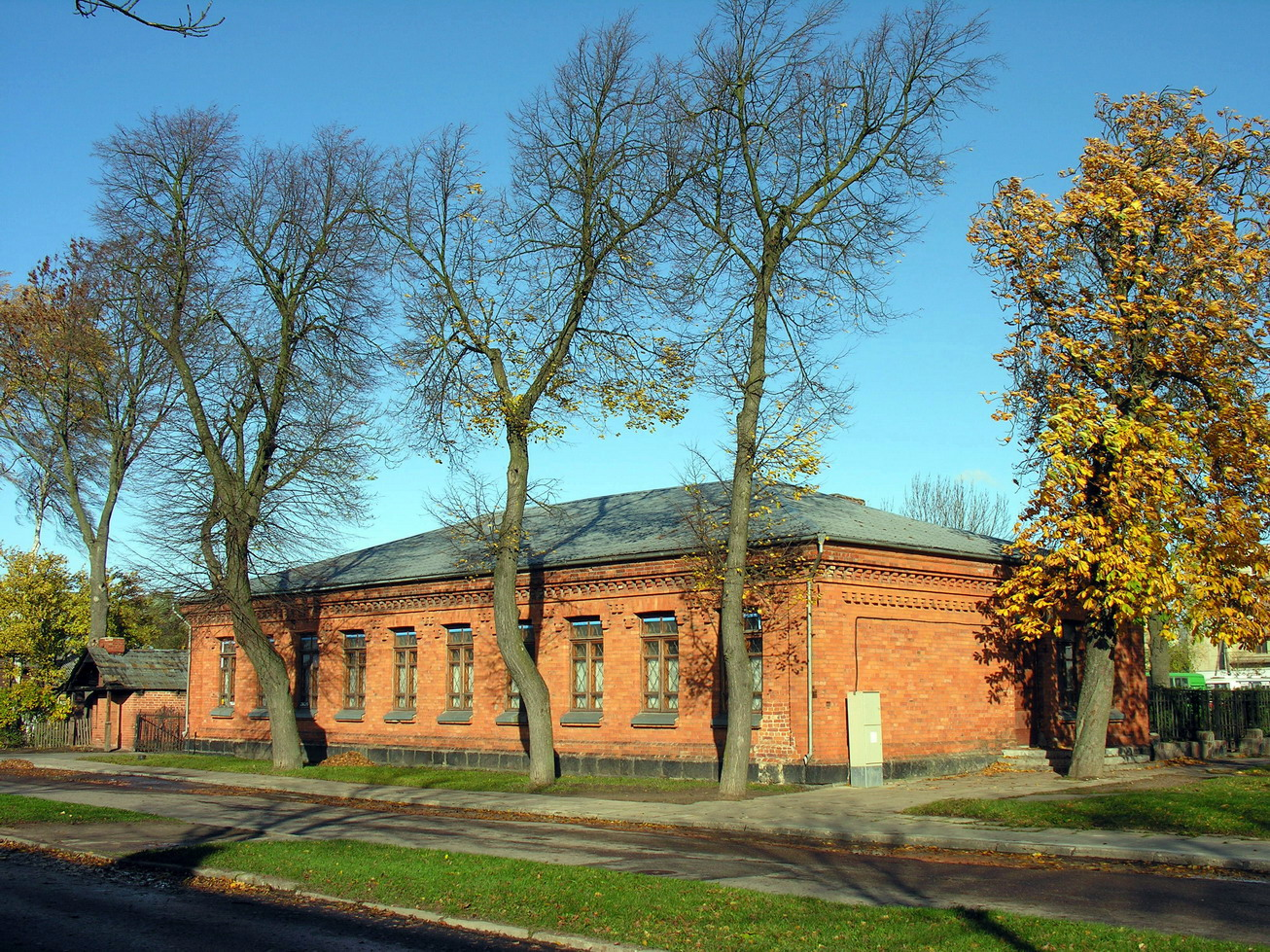 Žemaitėška: Mažeikē, tamė pastatė tarpukarie bova Lietuvuos kariuomenės komendatūra Puortegrapėjė: Algėrda, 2006 m. spalė 27 d., Žemaitėjė